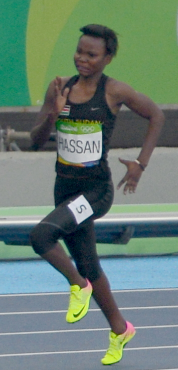 4ème Série du 200m féminin de Rio 2016